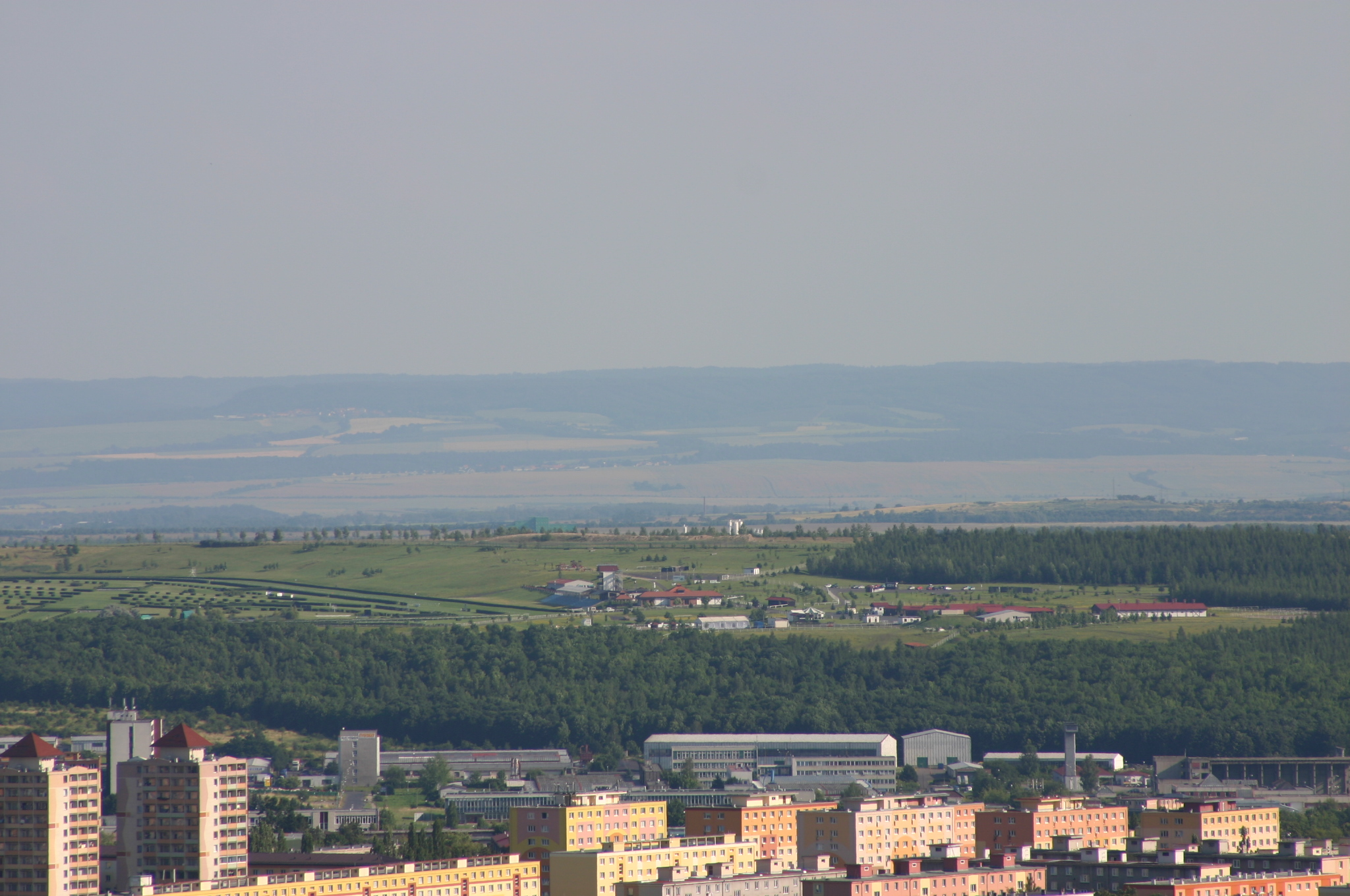 Wellbuditzer Bergbaukippe bei Brüx (Most)